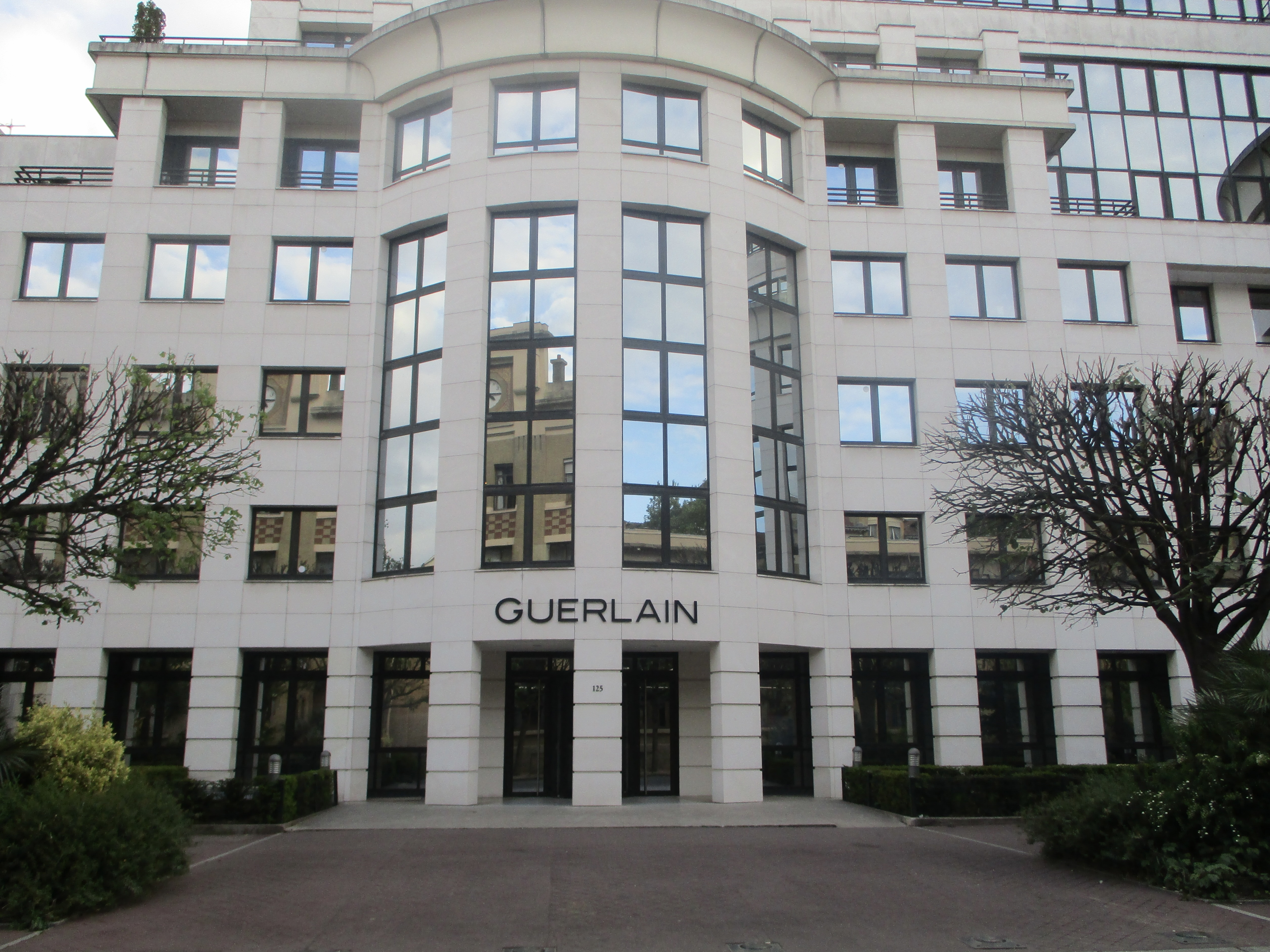 Bureaux de Guerlain à Levallois-Perret, rue du Président-Wilson.